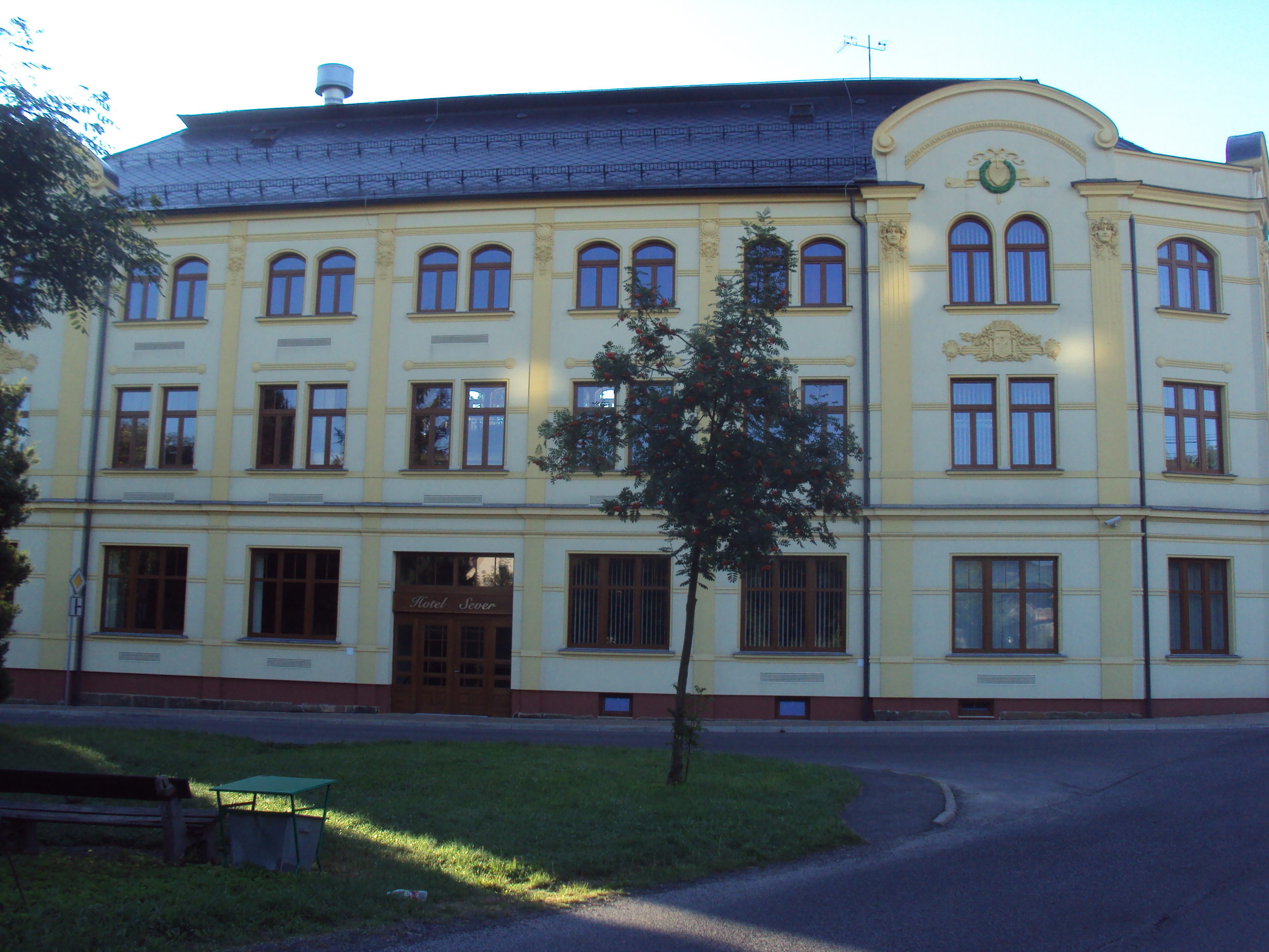 Hotel Sever je nyní multifunkčním zařízením města Cvikov, Žitavská 132